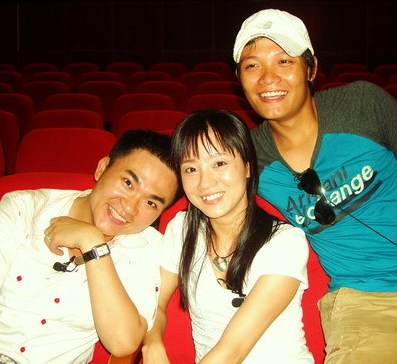 Bên cạnh các đồng nghiệp